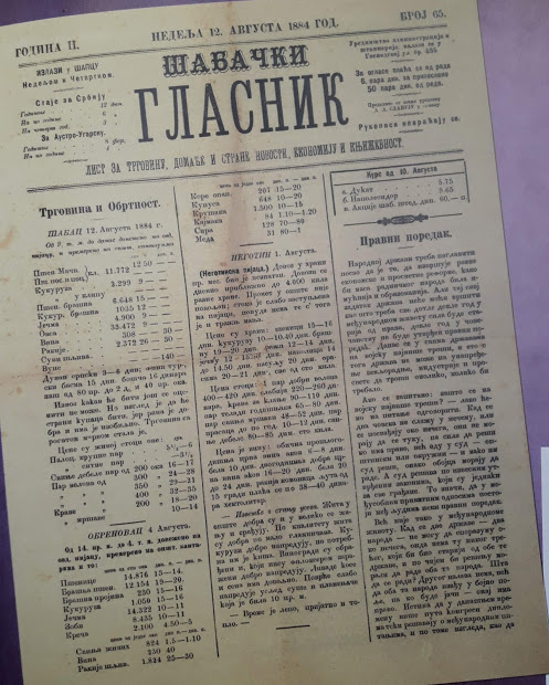 Šabački glasnik Andrije Slavuja